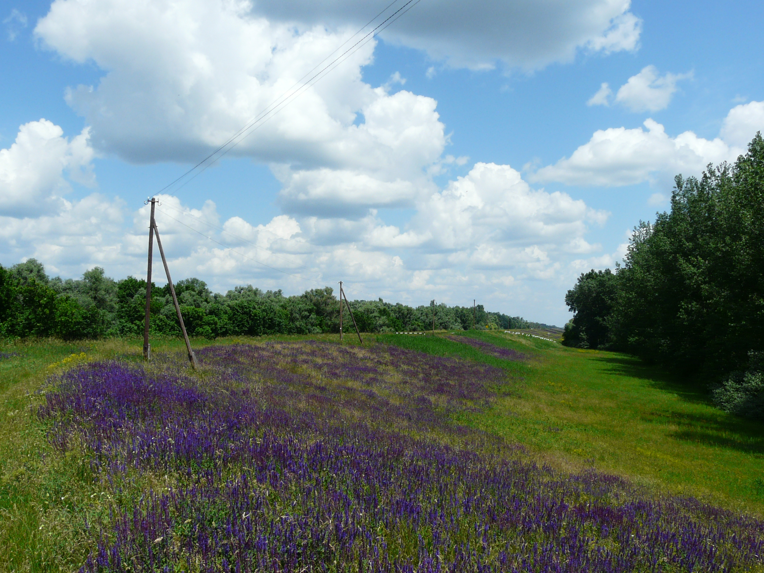 A Tisza, Tápéval szemközti oldalán található a Tápéhoz hasonlóan szintén ősi vidék: a Tápai-Rét.